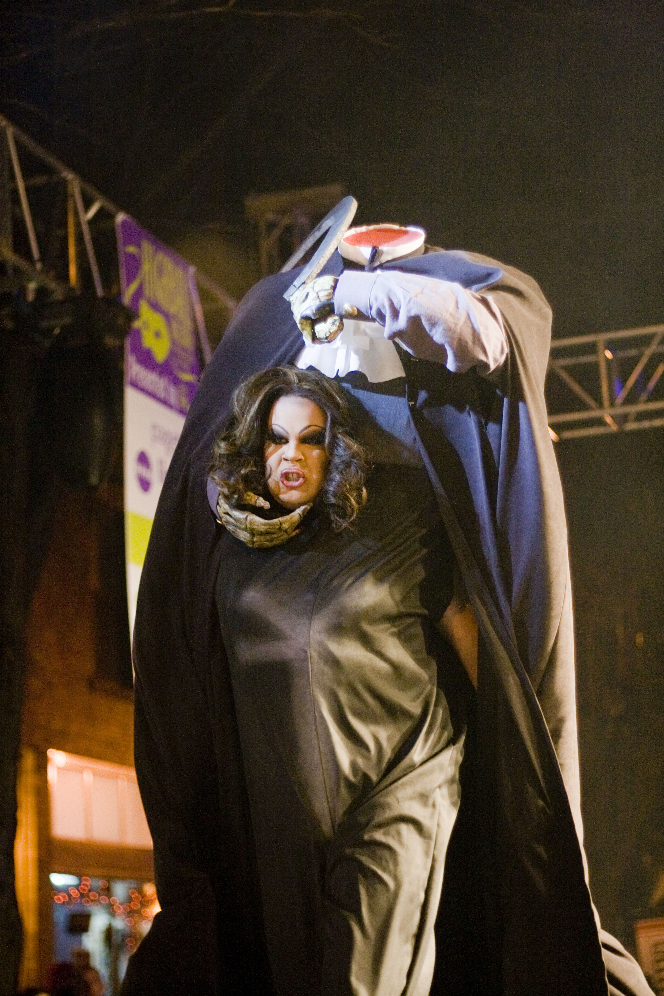 Nina West au Highball Halloween 2009, The Short North, Columbus.